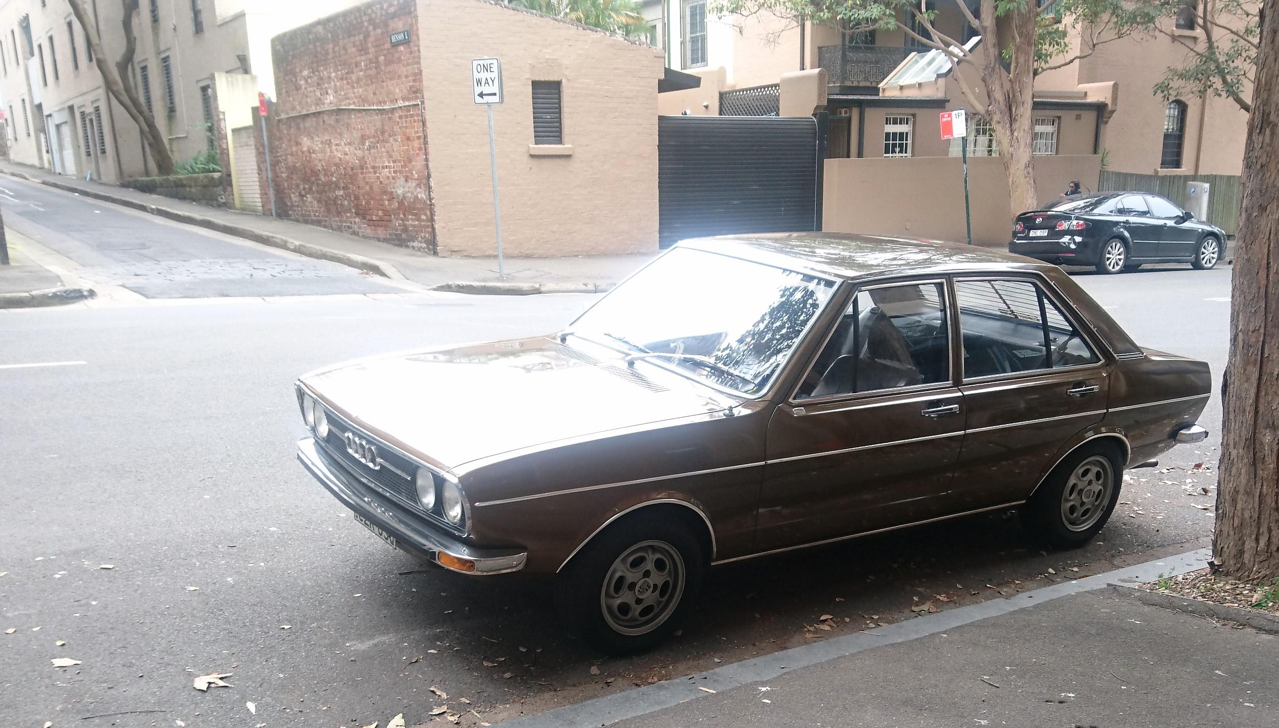 Audi Fox